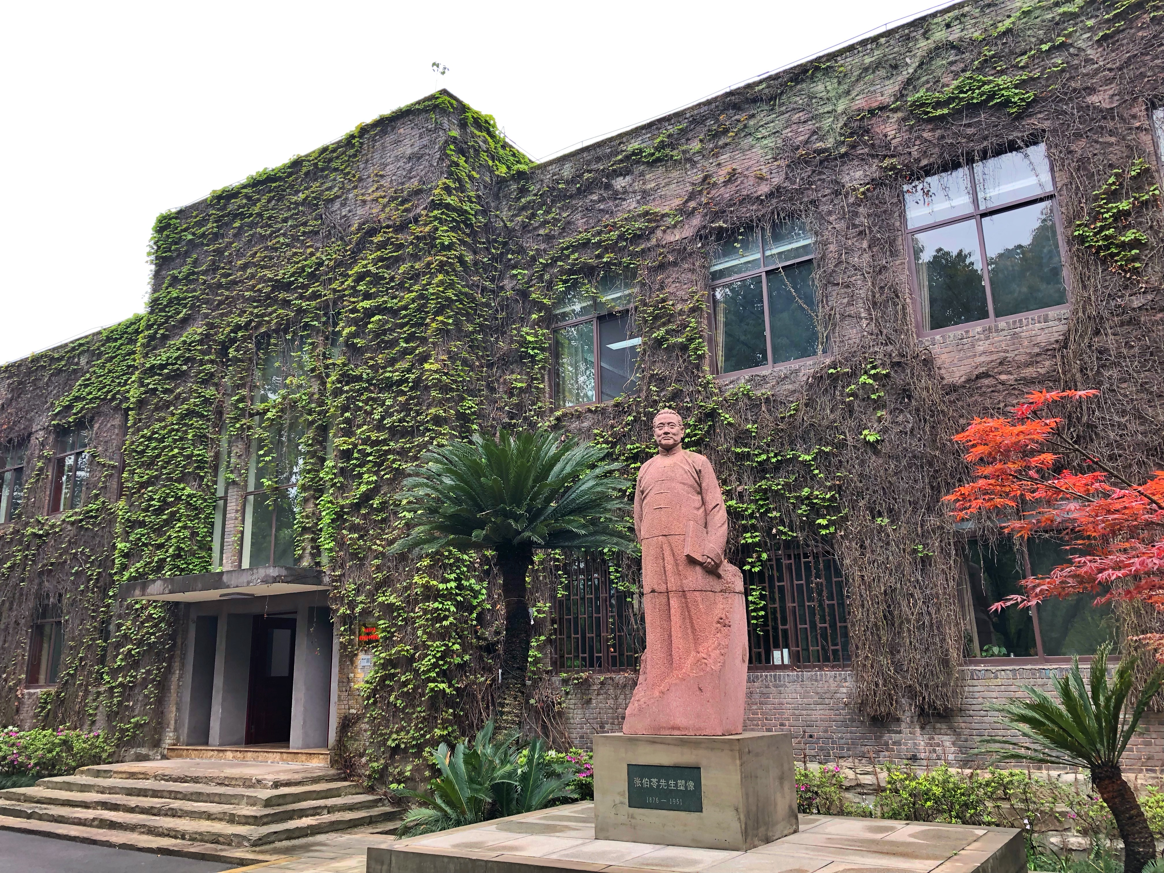 中文（中国大陆）: 重庆南开中学张伯苓先生塑像